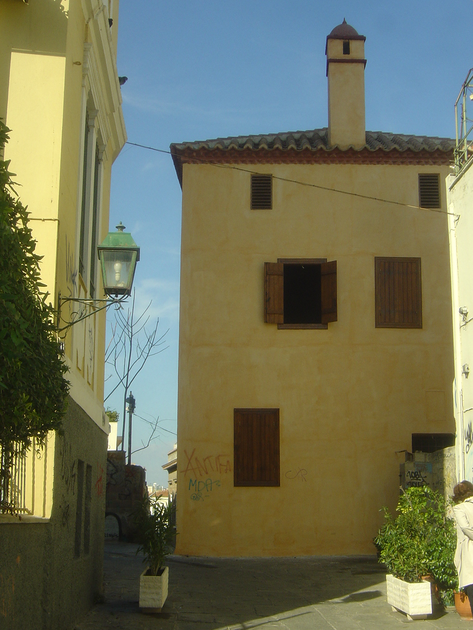 Το σπίτι του Τσωρτς, αρχιστράτηγου των ελληνικών δυνάμεων στην Ελληνική Επανάσταση του 1821.